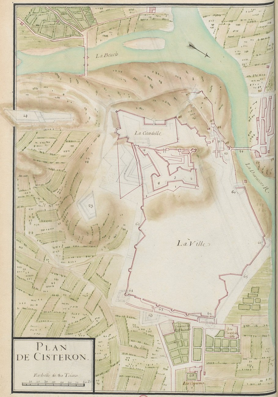 Plan général de la citadelle et de la ville de Sisteron en 1693 publié dans le Recueil des plans des places du Royaume, divisées en provinces.